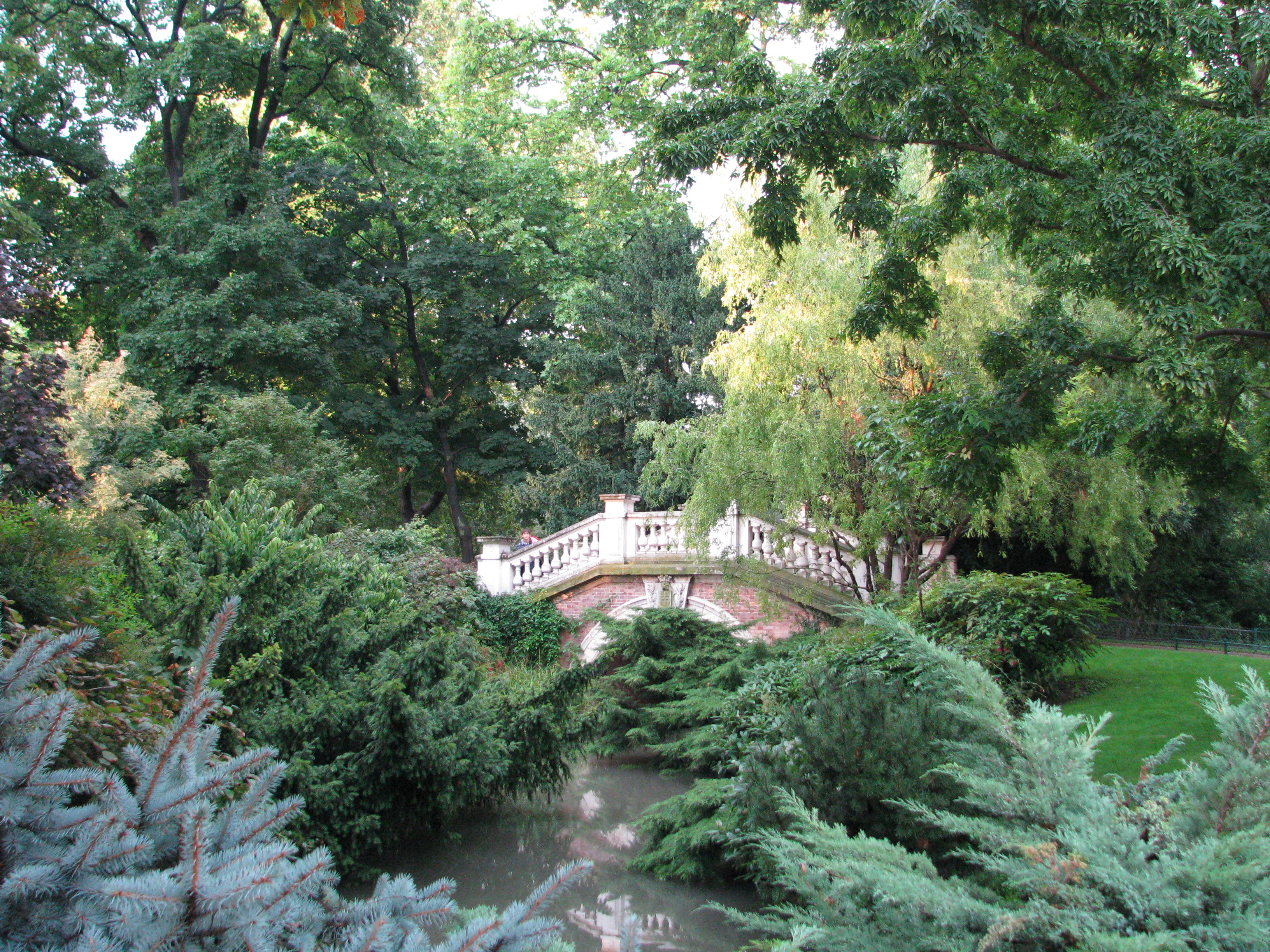 Veduta di Parc Monceau, Parigi